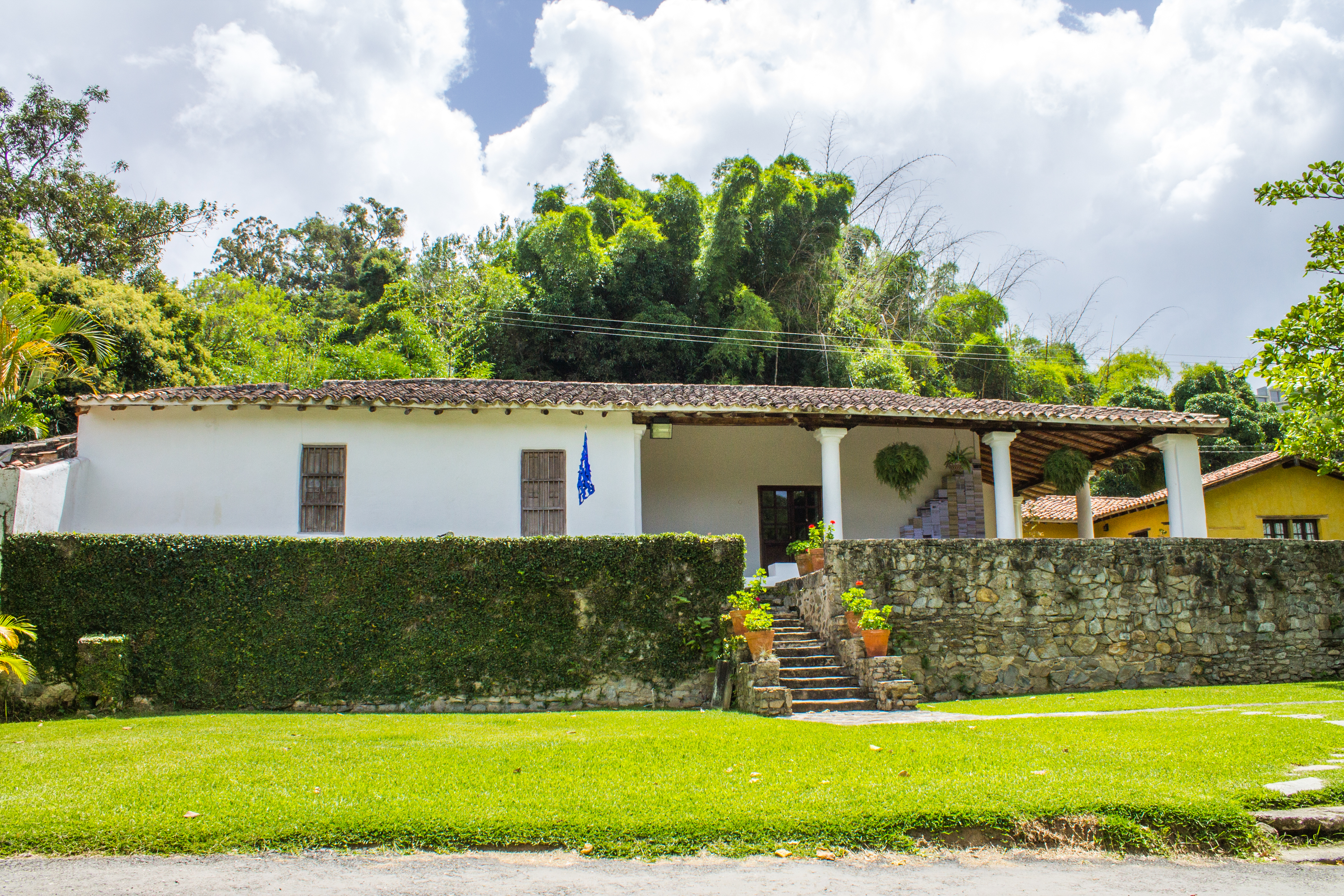 Conjunto Hacienda La Trinidad